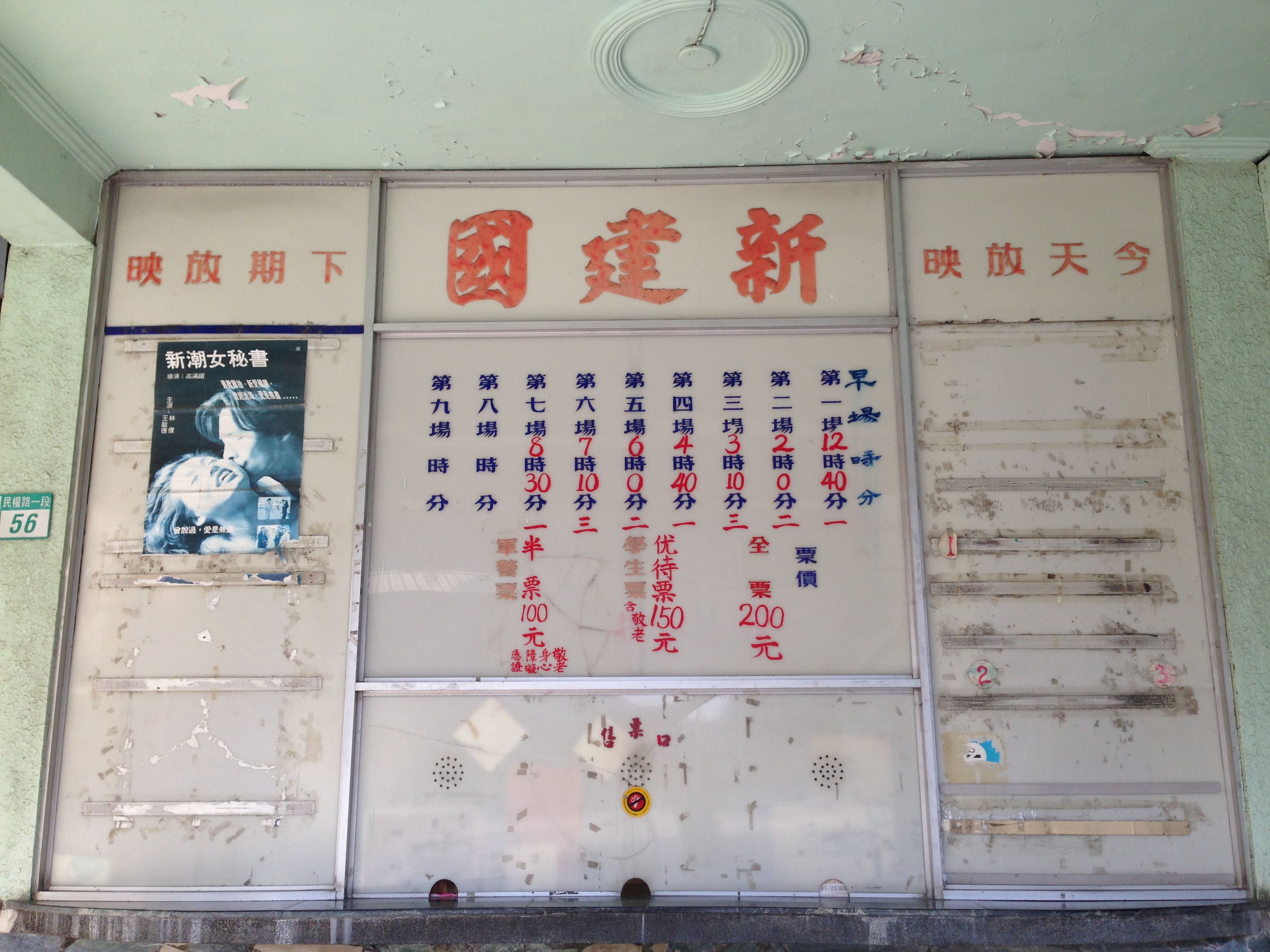 中文（台灣）: 新建國戲院正面售票口